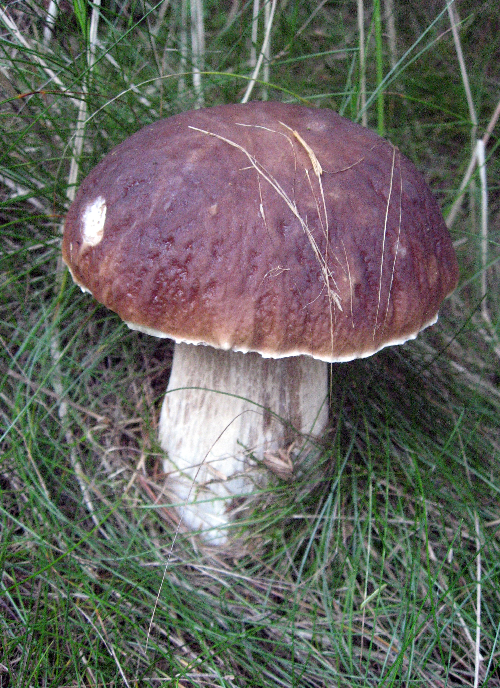 Hřib smrkový